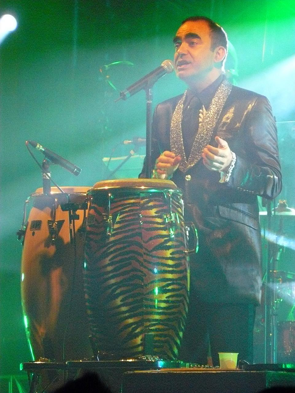 Elio suona le congas ("i bonghi") in Parco Sempione. Lumbaart: L'Elio el sòna i bongh.